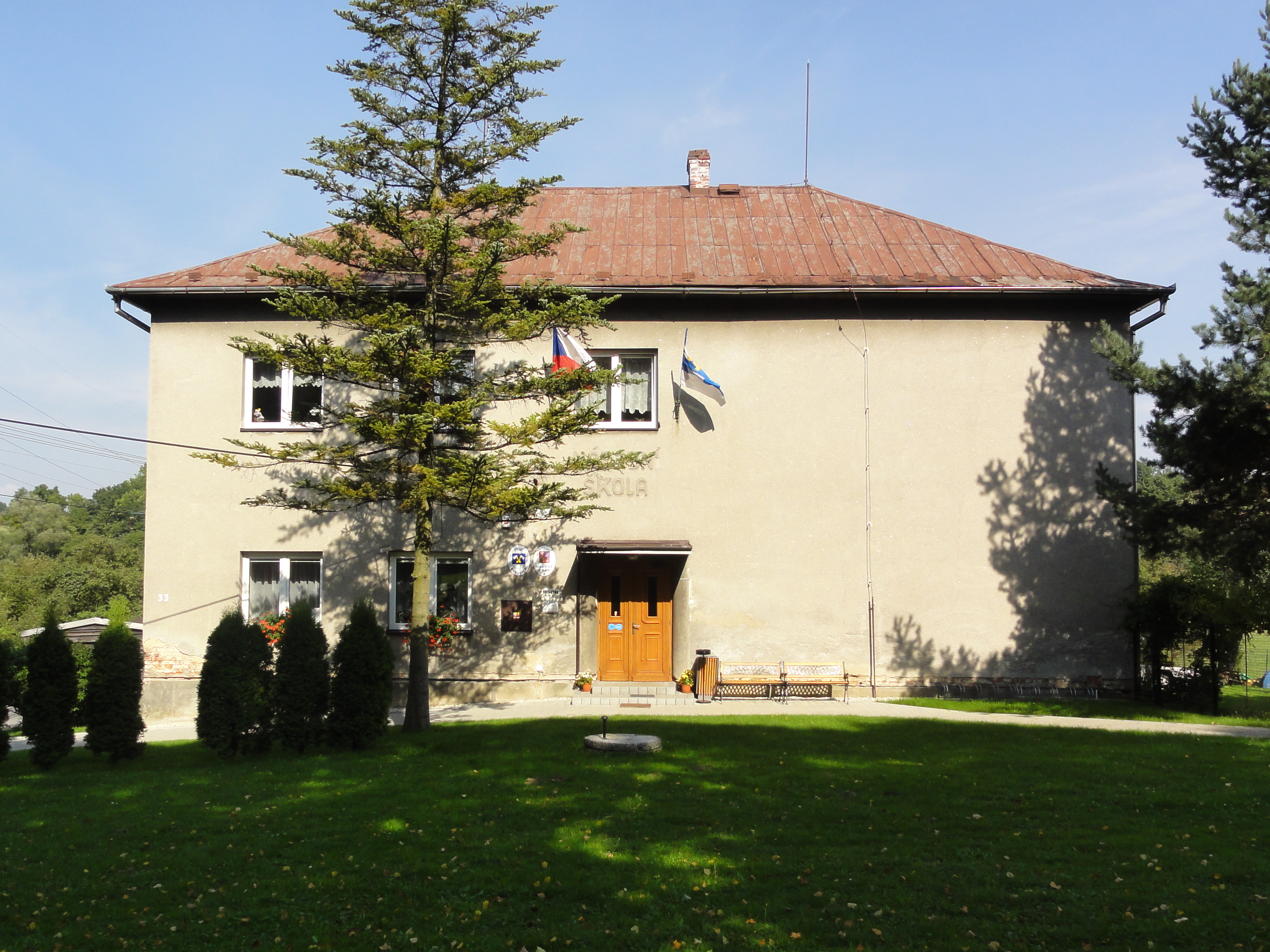 Urząd gminy i szkoła w Kaniowicach